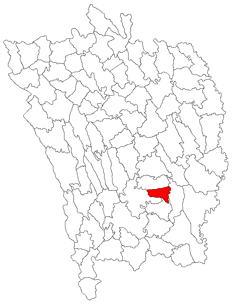 Categorie:Hărţi ale judeţului Vaslui